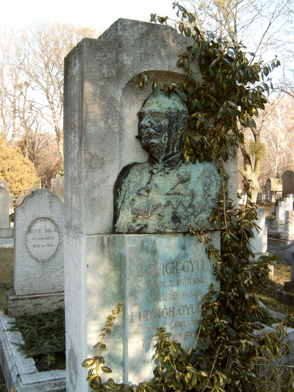 Ludvigh Gyula; Ludwig (Szepesbéla, 1841. ápr. 21. – Bp., 1919. jan. 6.): vasútépítő mérnök, Ludwigh János fiának sírja Budapesten. Kerepesi temető: 34-4-34 [szobrász: Siklódy Lőrinc].